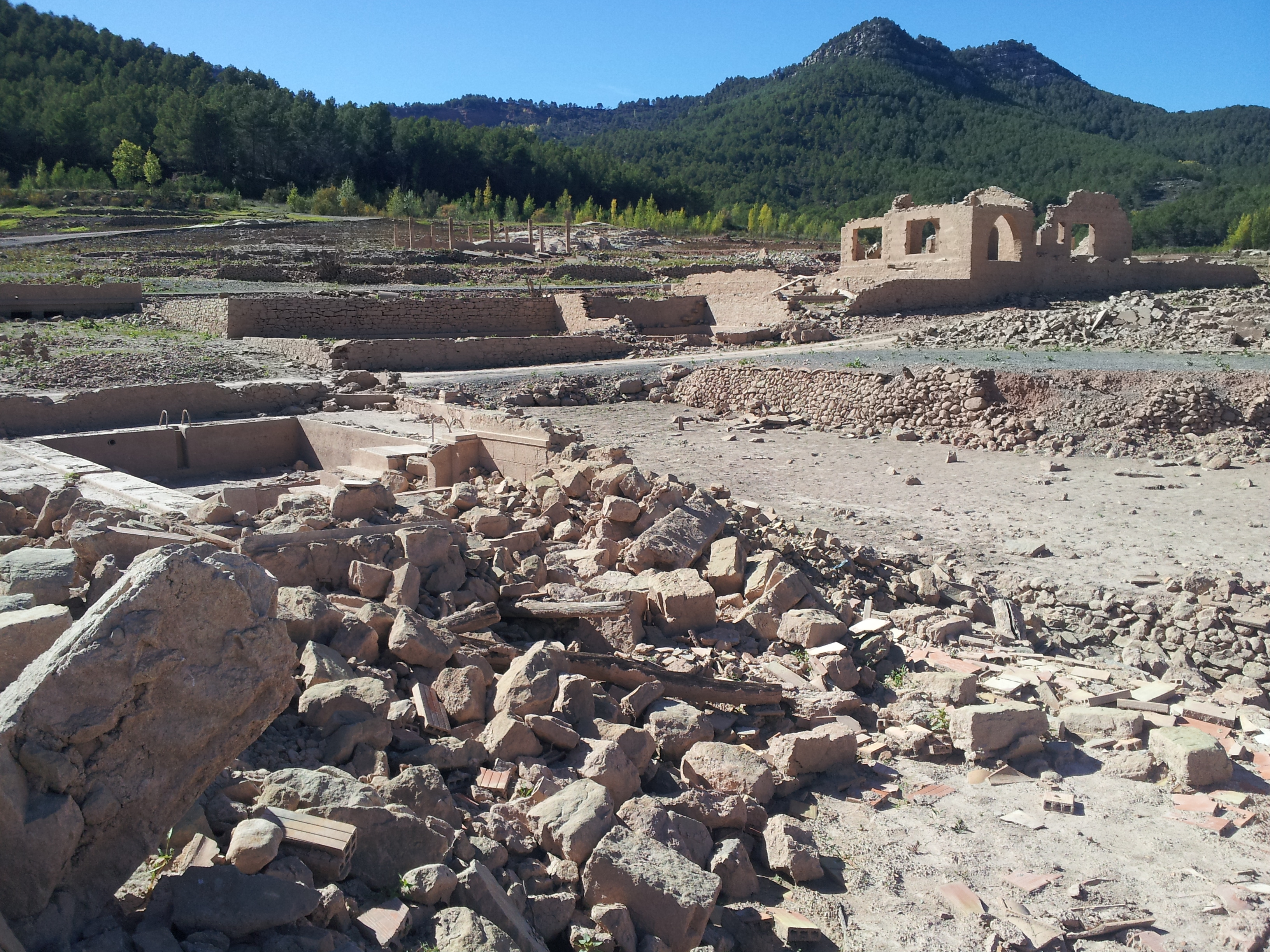 Campos d'Arenós en 2014, amb el Pantà sec.